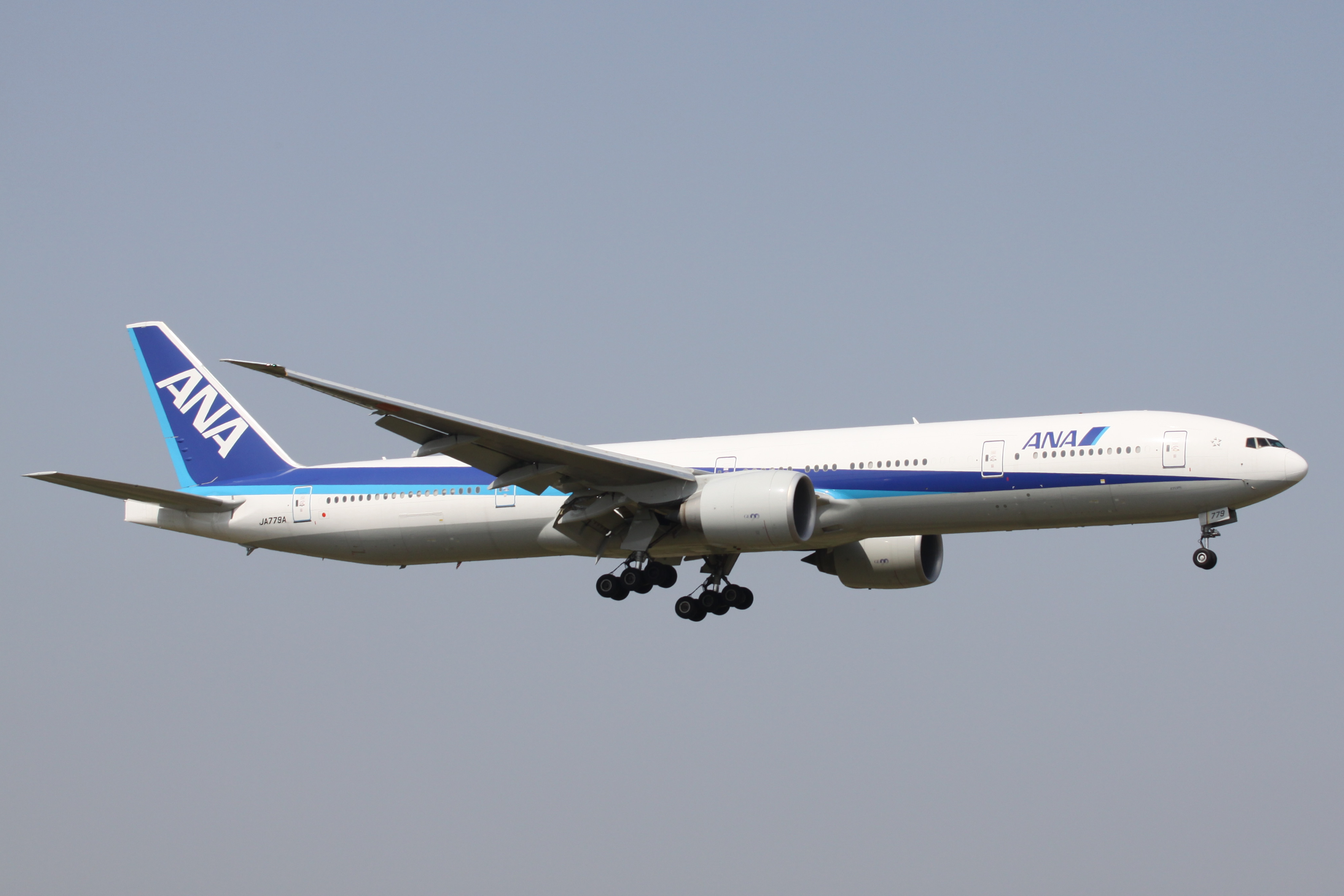 ANA B777-300(JA779A)